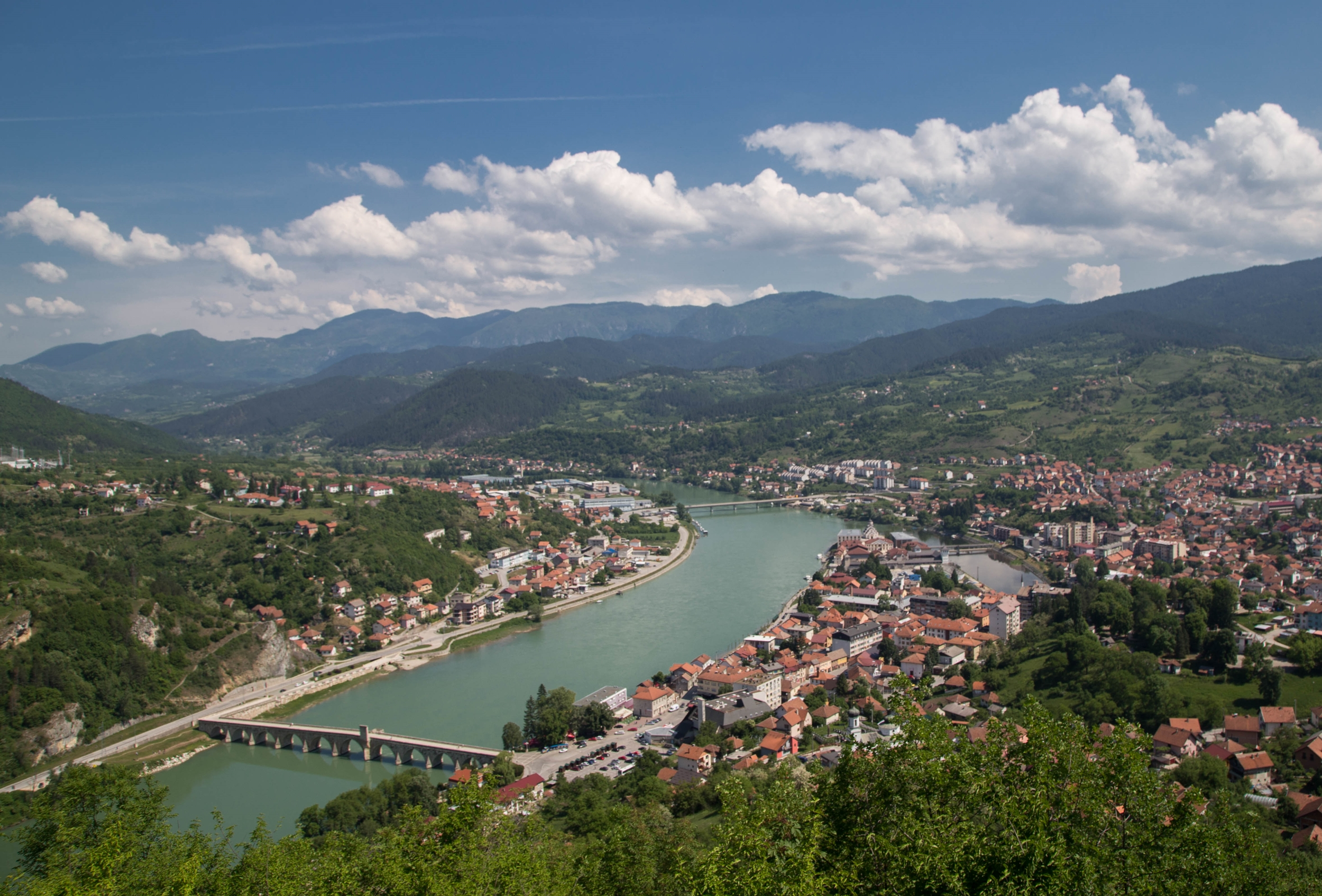 Most Mehmed-paše Sokolovića u Višegradu This image was uploaded as part of Trace of Soul 2018.